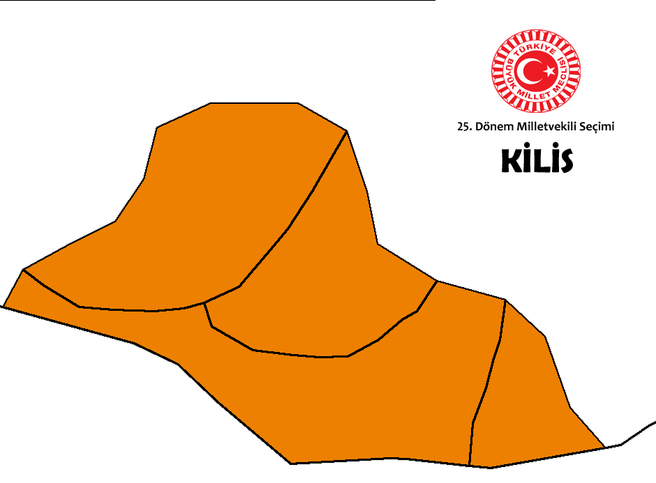 2015 genel seçim sonuçları